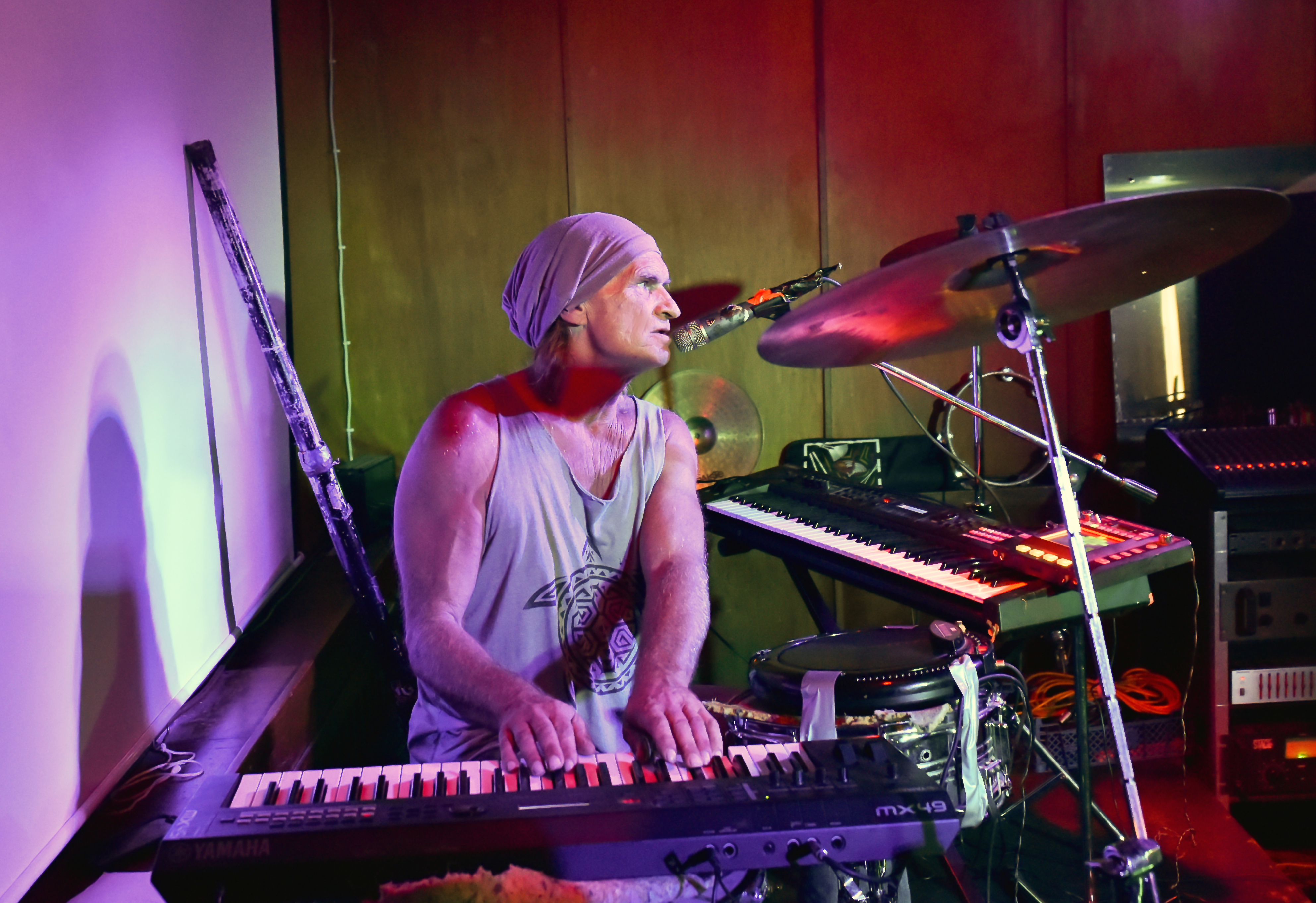 Andy Holm Live in Concert im Taps in Uetersem